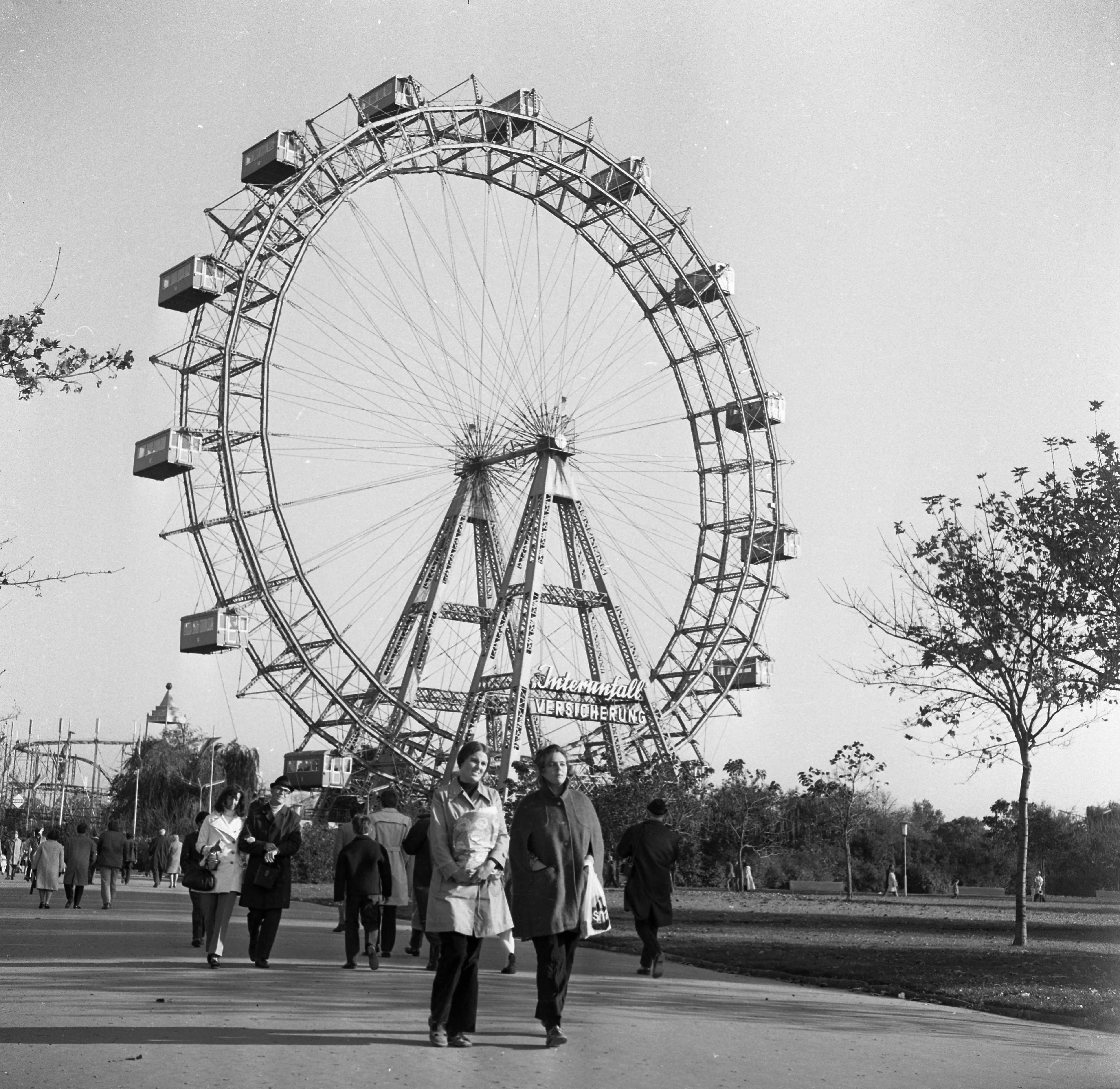 Práter. Location: Austria, Vienna Tags: Ferris wheel, amusement park Title: Práter.